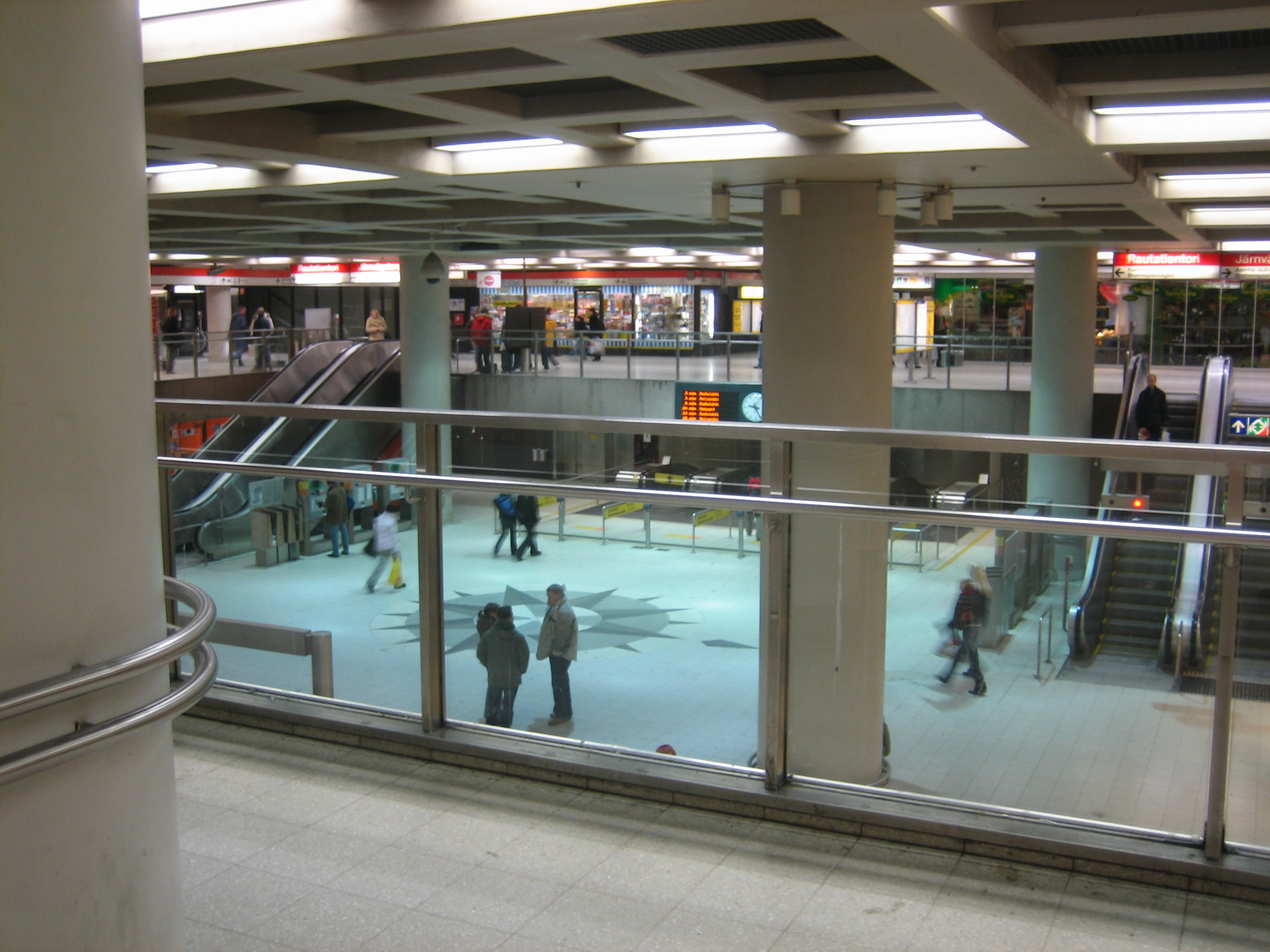 Helsingin asematunneli 4.1.2006.